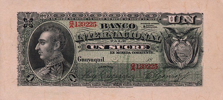 1 эквадорский сукре. Выпуск Интернационального Банка, Эквадор. Аверс. Портрет Сукре.